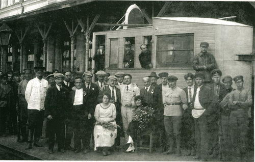 Последняя прижизненная фотография Артема. Возле аэровагона Абаковского во время работы III Конгресса Коминтерна и І Конгресса Профинтерна. Члены Международного Комитета пропаганды и действия революционных горнорабочих: Фёдор Сергеев (Артём), Гельбрих и Стрюпар, Фридман, Хьюлет, Константинов. На подножке – изобретатель вагона Абаковский.